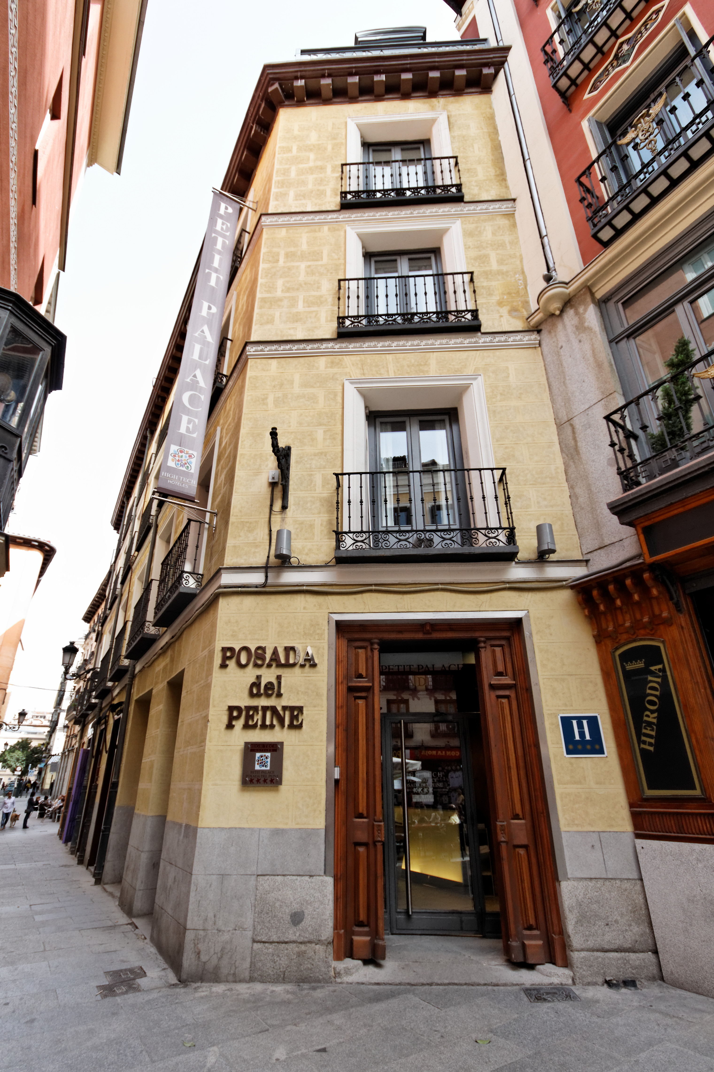 Posada del Peine, Madrid.